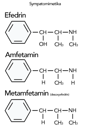 Strukturer af de vigtigste sympatomimetika